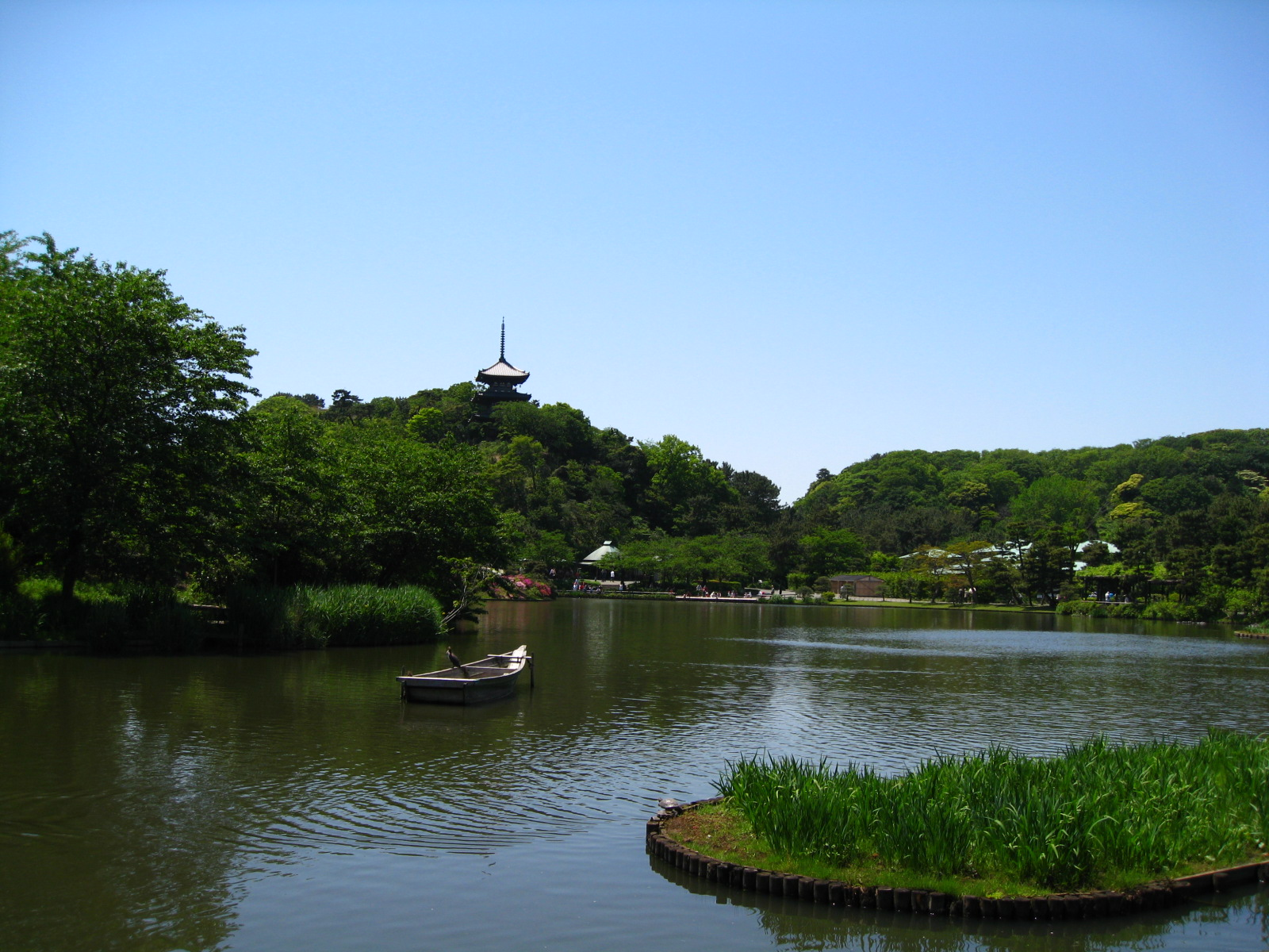 Sankeien Garden